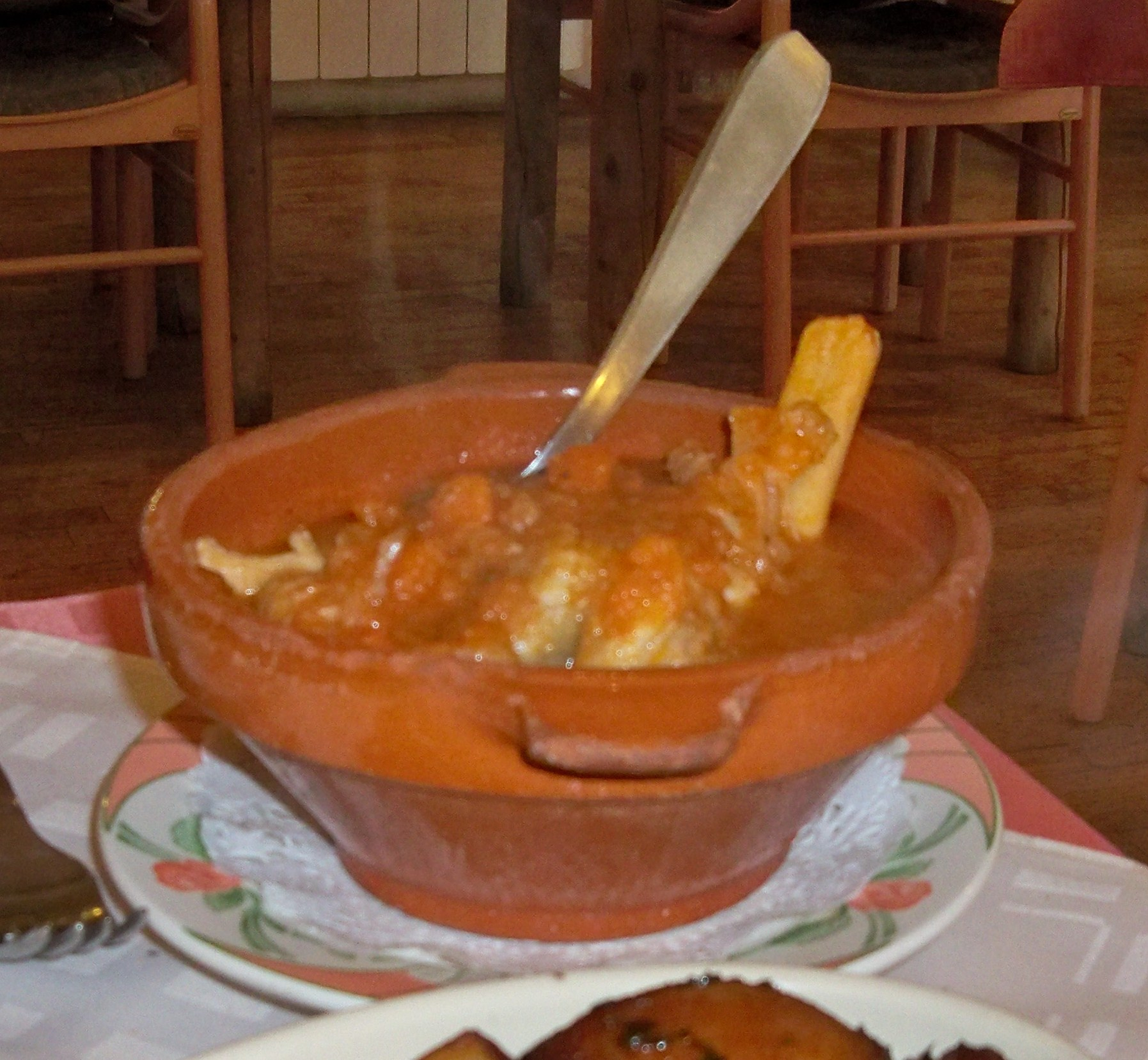 Pieds et Paquets, spécialité de Sisteron (04)